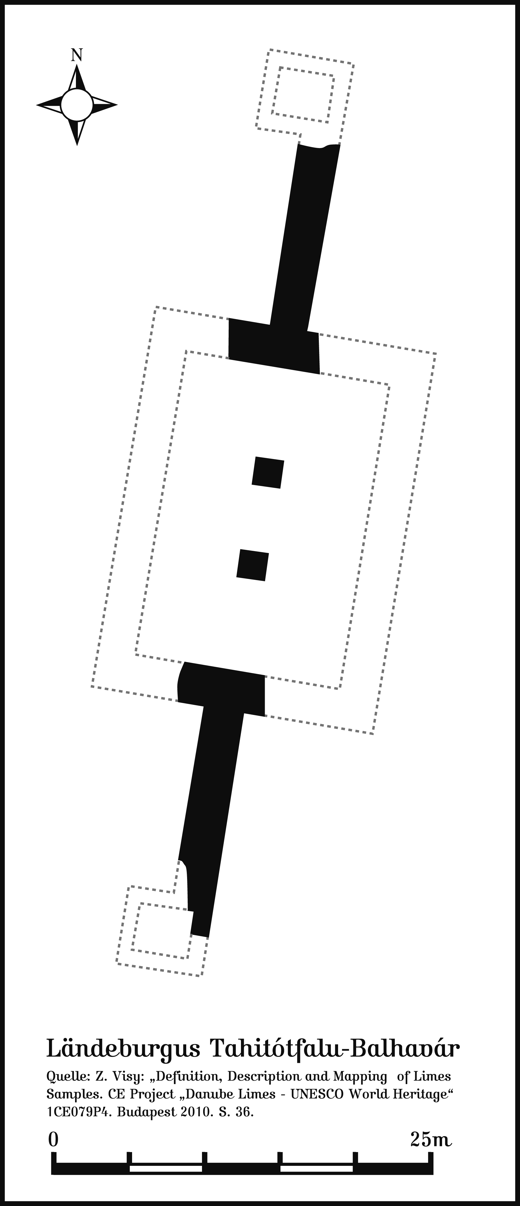 Der Ländeburgus Tahitótfalu-Balhavár am nordpannonischen Donaulimes in Ungarn.